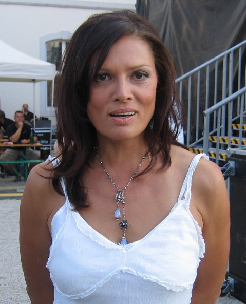 Stefanie Tücking als Moderatorin bei einem SWR3-Open-Air im Schloss Engers in Neuwied